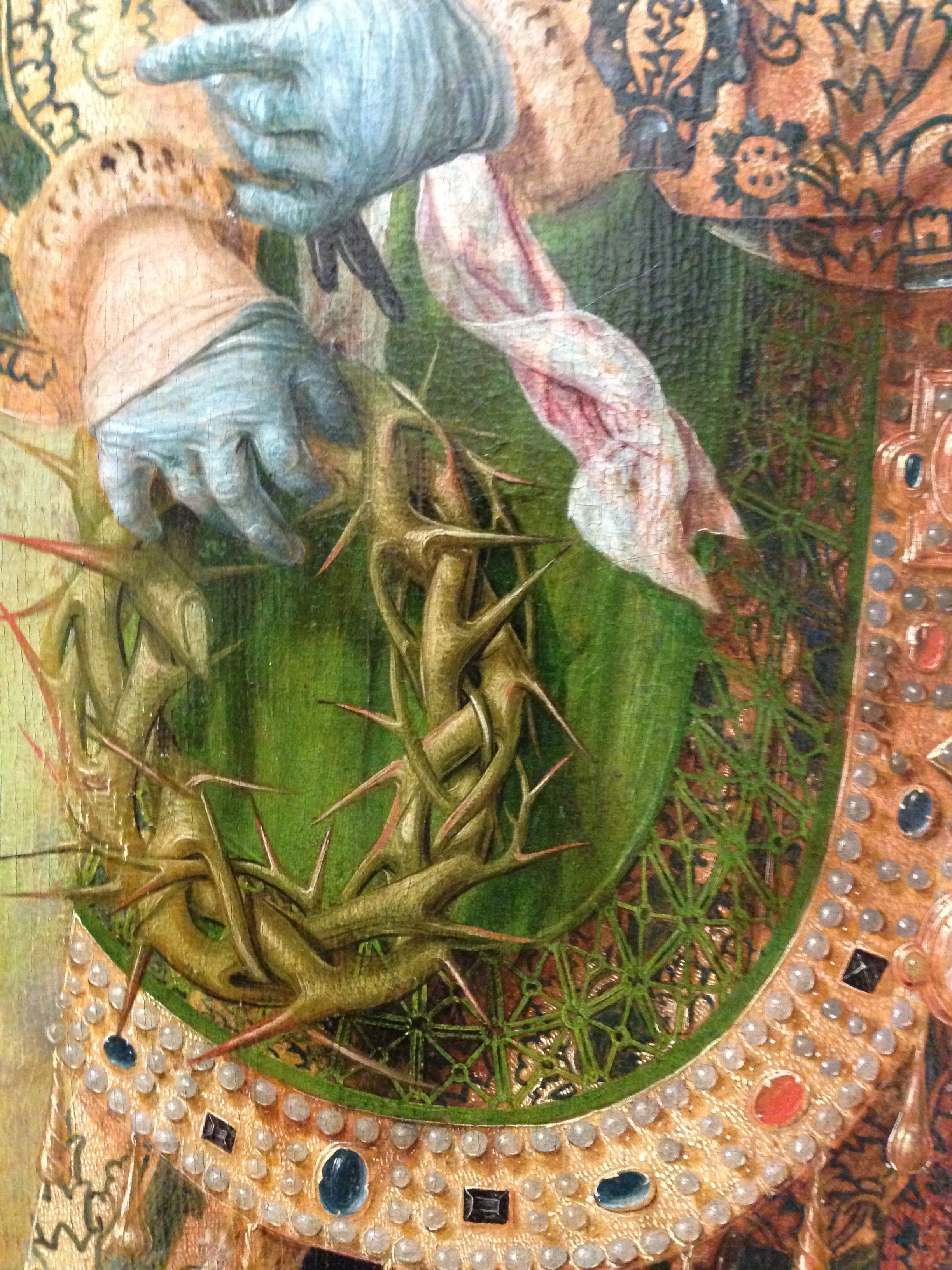 Pietà de Saint-Germain-des-Prés Couronne d'épine